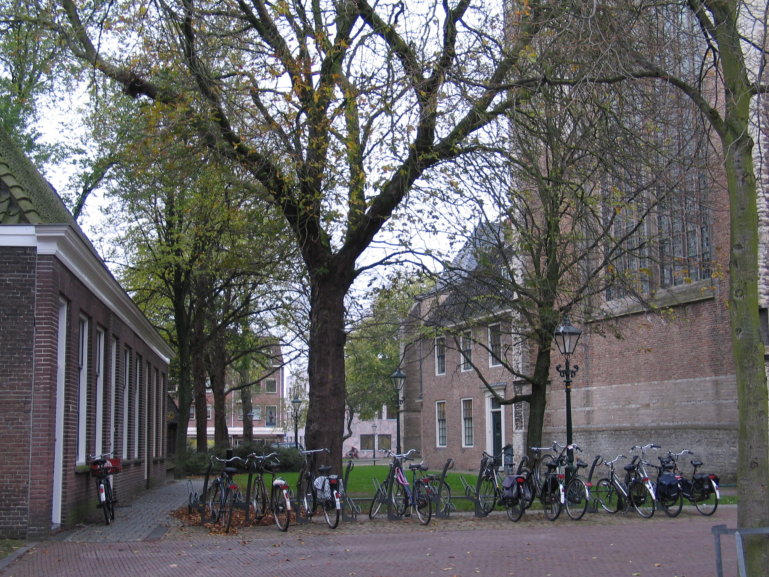 Huisjes in de Koorstraat in Alkmaar, met achter de Kerkstraat, voorheen Houtmanstraatje, aan het voormalige kerkhof van de Grote Kerk